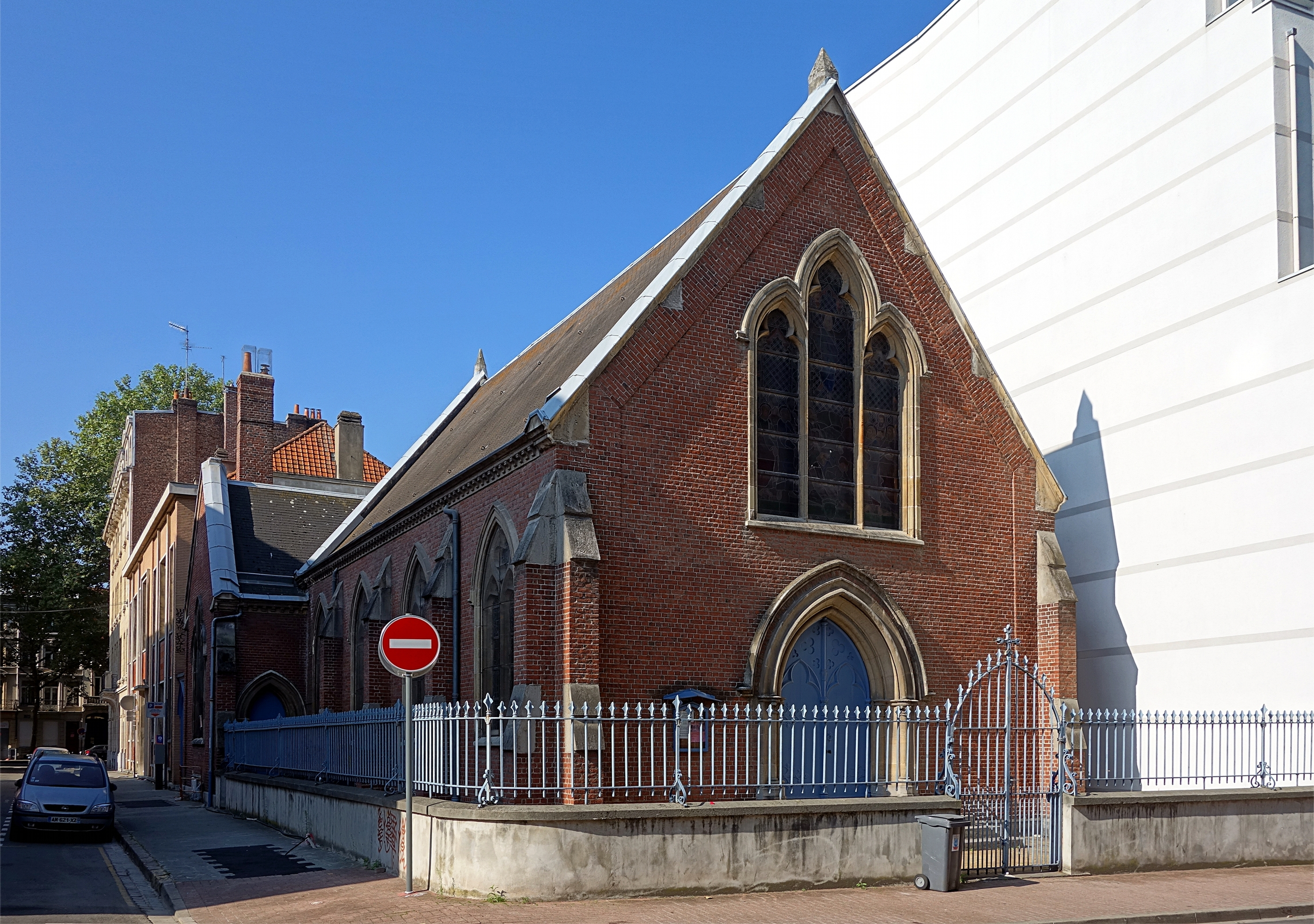 L'église anglicane de Lille.